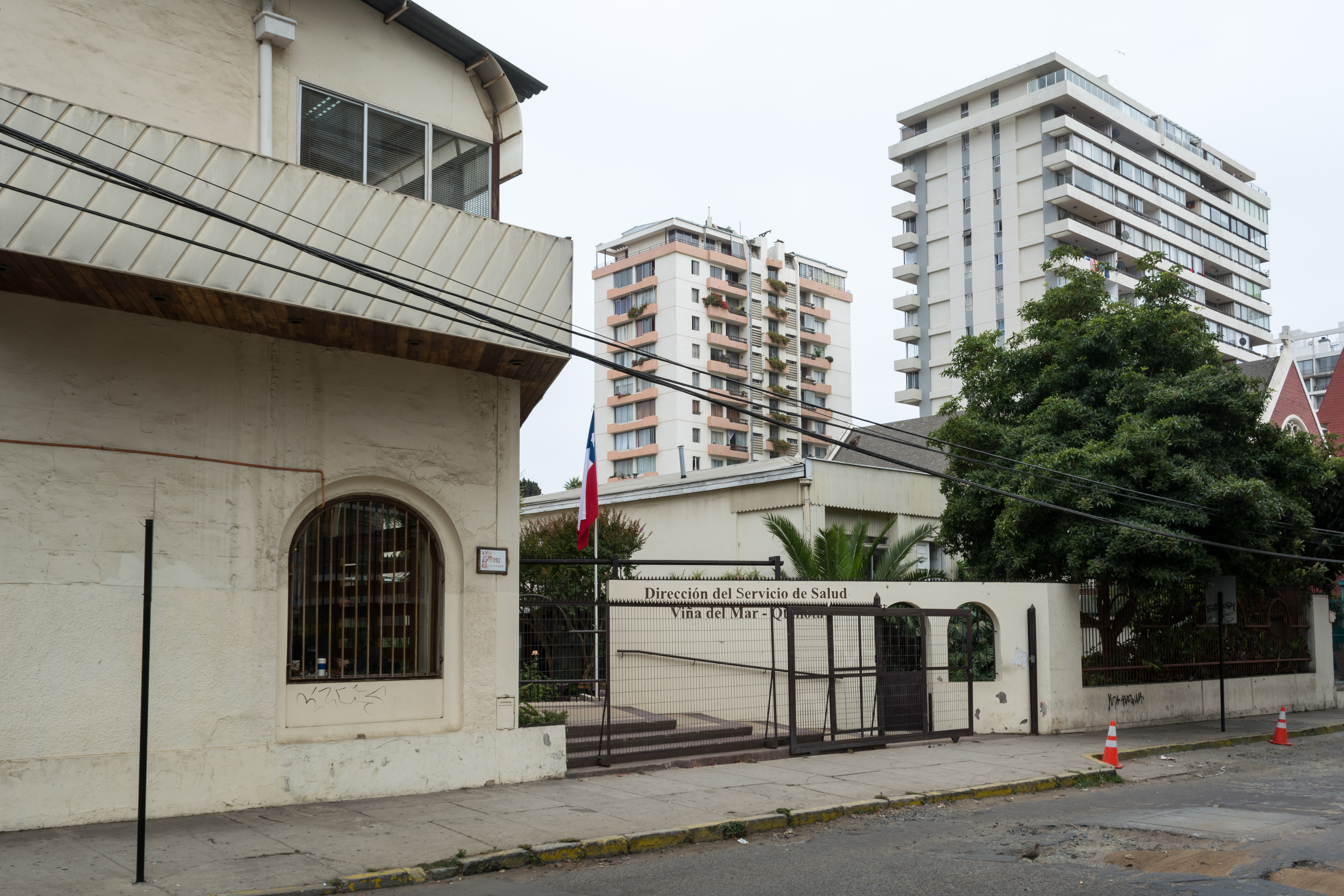 Servicio de Salud Viña del Mar-Quillota, Viña del Mar, Región de Valparaíso, Chile